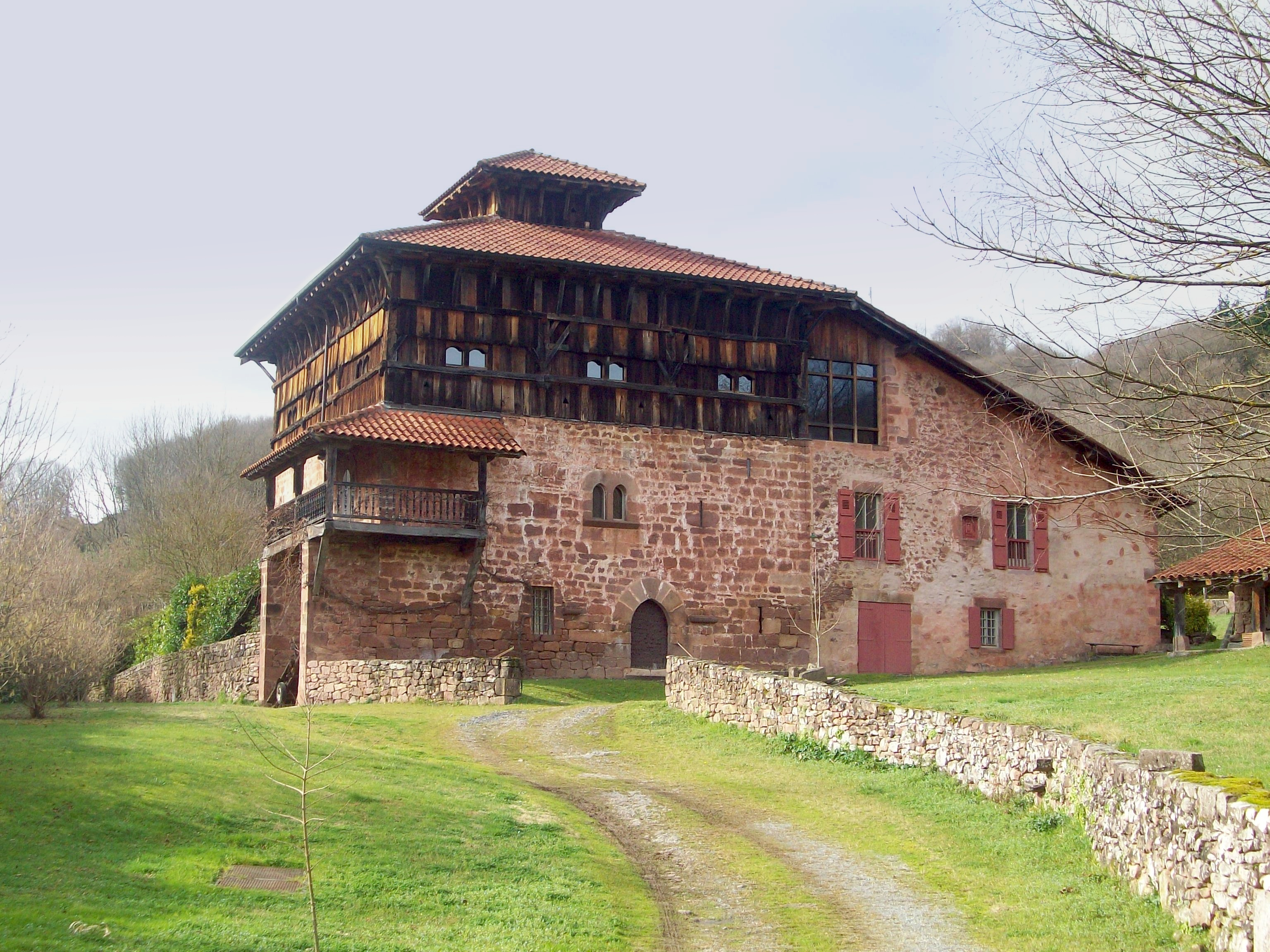 Baztango Arraioz udalerriko Jauregizarrea dorretxea. Nafarroa, Euskal Herria.